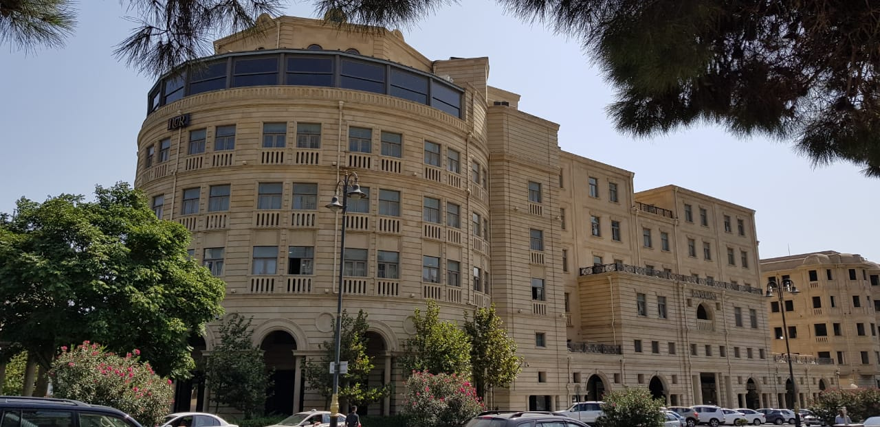 Tbilisi prospektində yerıəşən, "ASK Xidmət" MMC-yə məxsus "ASK Plaza"